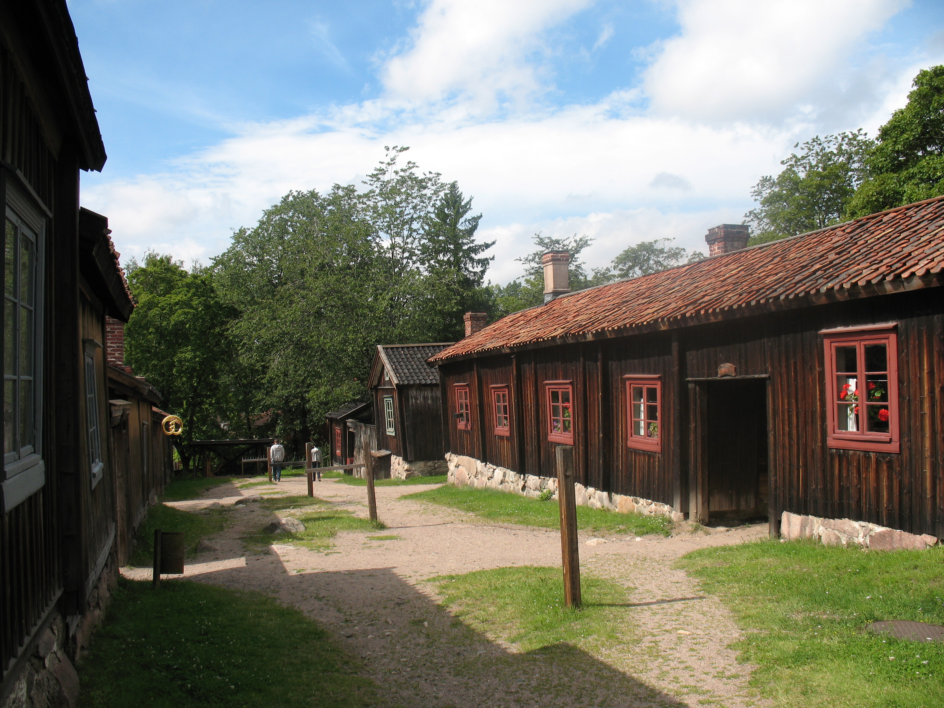 Luostarinmäki Handicrafts Museum in Turku, Finland